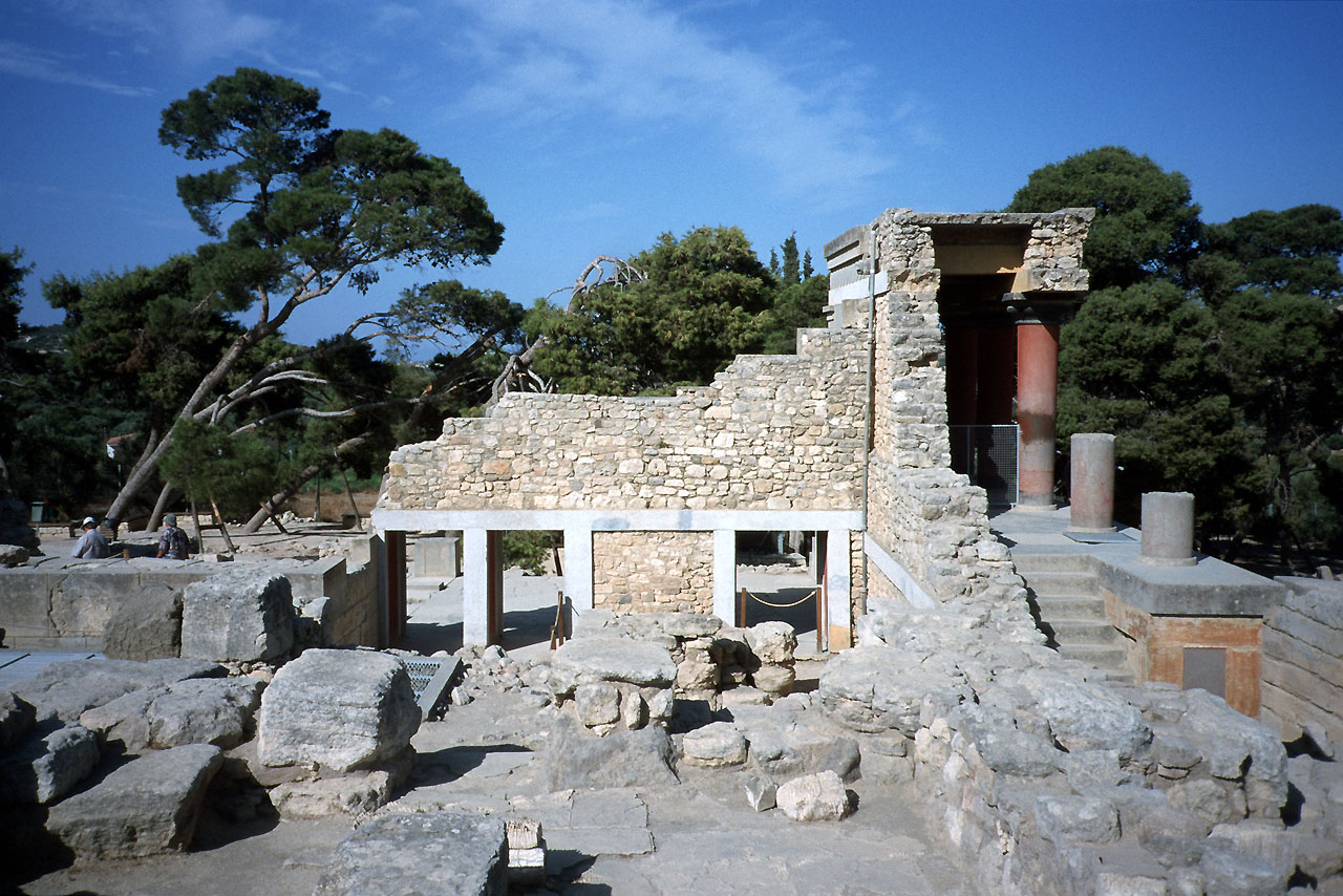 Bildbeschreibung: Knossos - Rekonstruktion Quelle: photographed by me Fotograf/Zeichner: Andree Stephan Datum: Autumn 2000 Sonstiges: ...